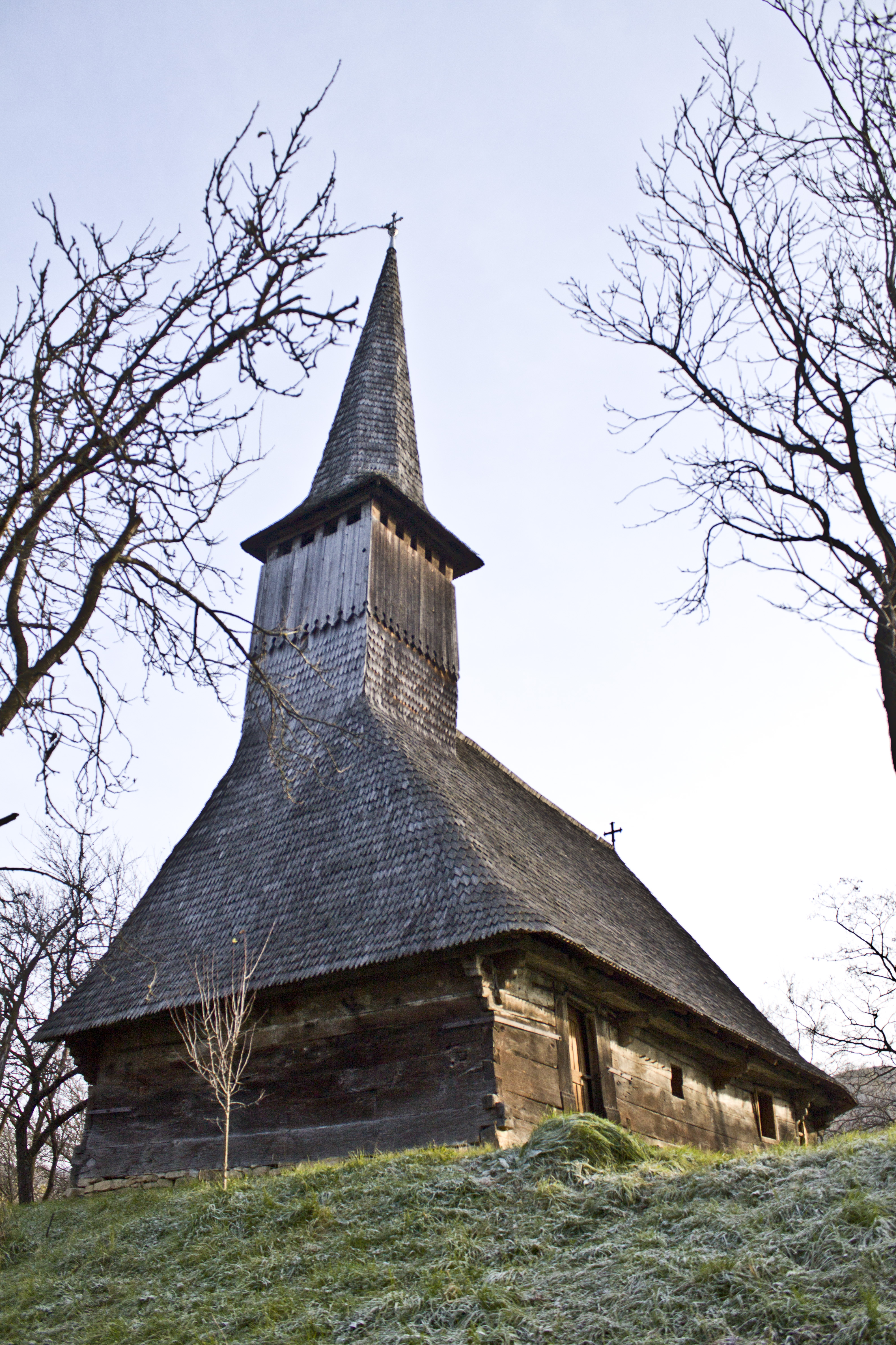 Biserica de lemn din Solomon, judeţul Sălaj.